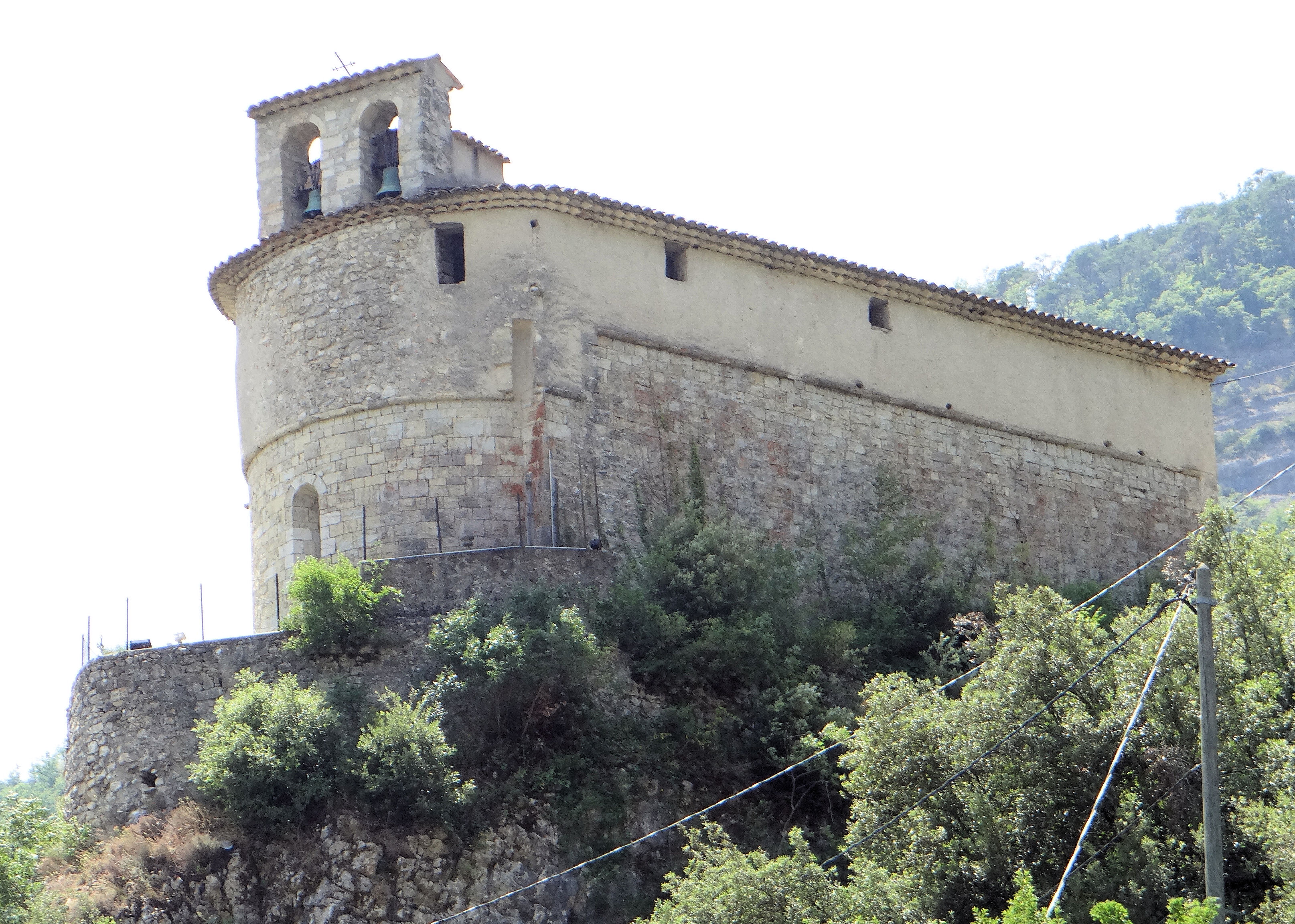 Roquestéron-Grasse - Eglise Sainte-Pétronille au-dessus du village